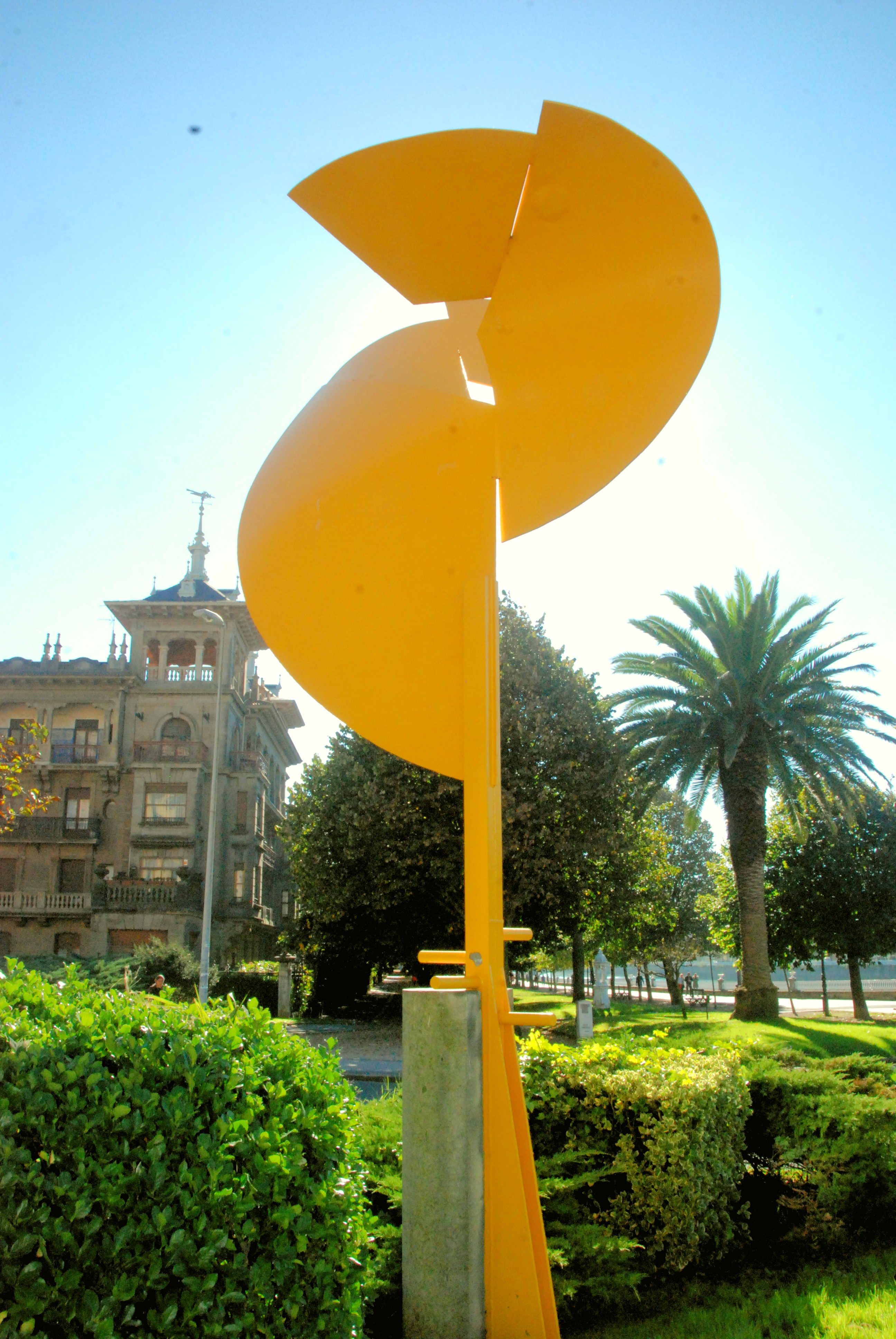 Joan Ignazio Iztueta-ren eskultura Donostian